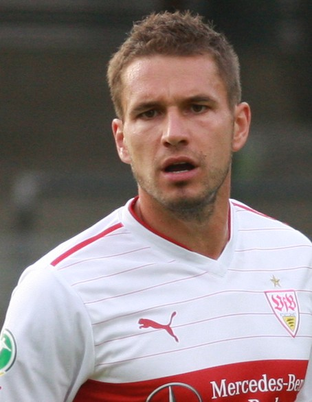 Marco Grüttner beim Spiel gegen Darmstadt 98. Aufgenommen von